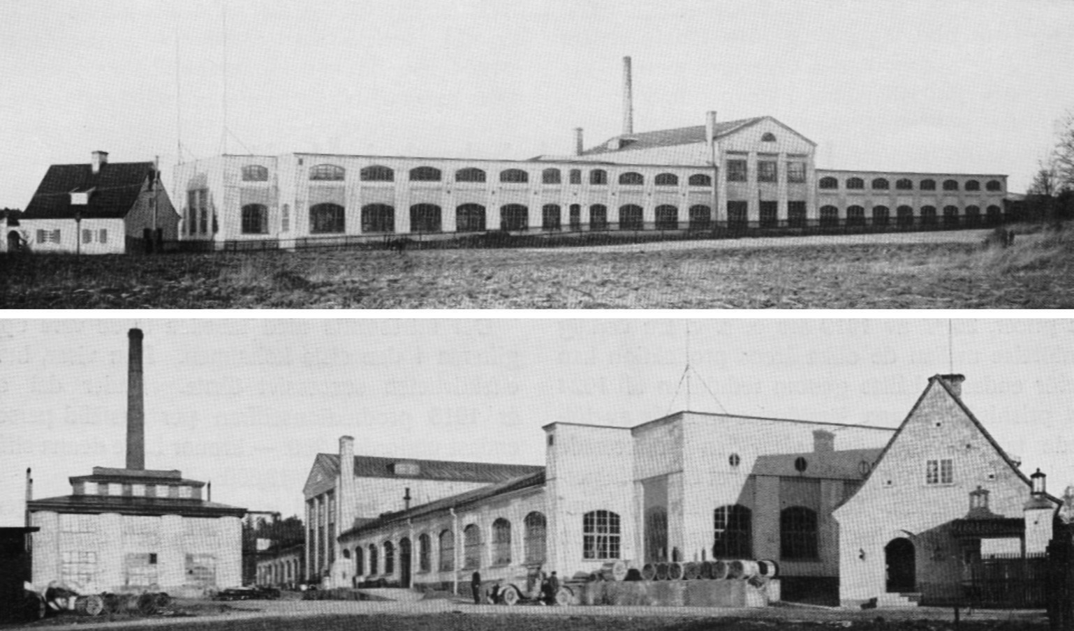 Nya kabelverket.